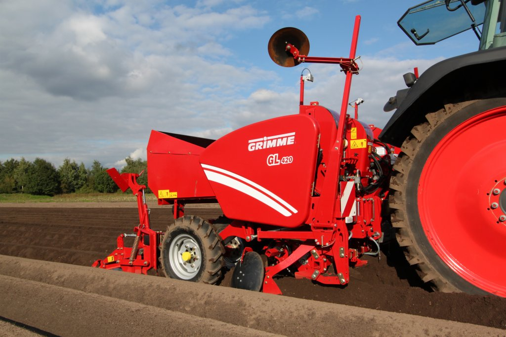 Die GL 420 ist eine getragene, 4-reihige Legemaschine.